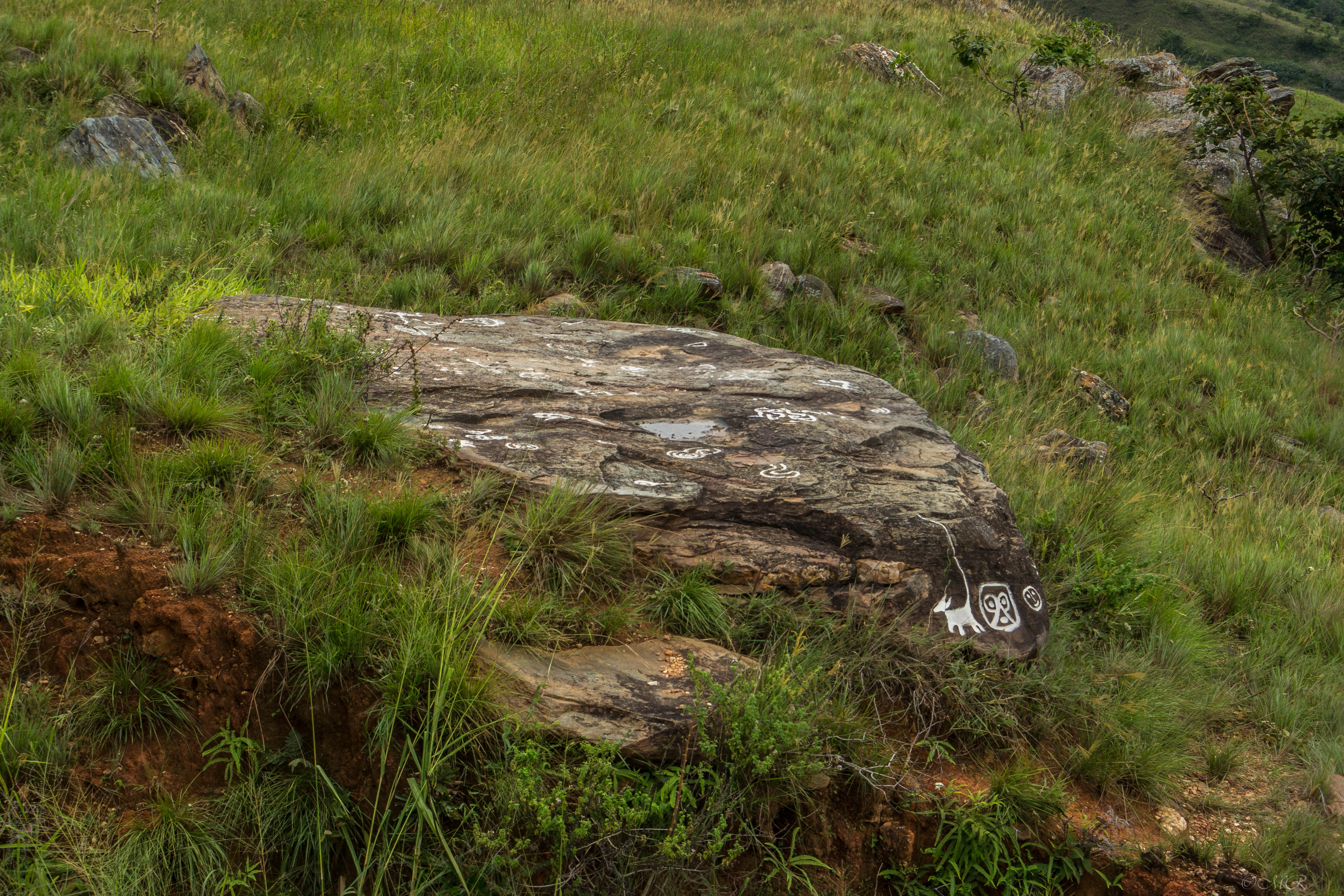 La Cumaca, Complejo De Petroglifos